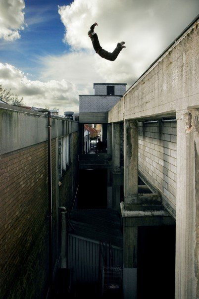 Martin Coops - Professionel parkour udøver, stuntman og model. Martin startede Parkour i Danmark sammen med Team JiYo.